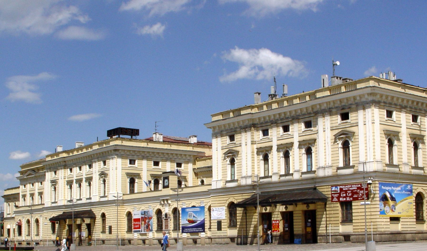 Kraków Główny Osobowy - Budynek Dworcowy Krakow main railway station.